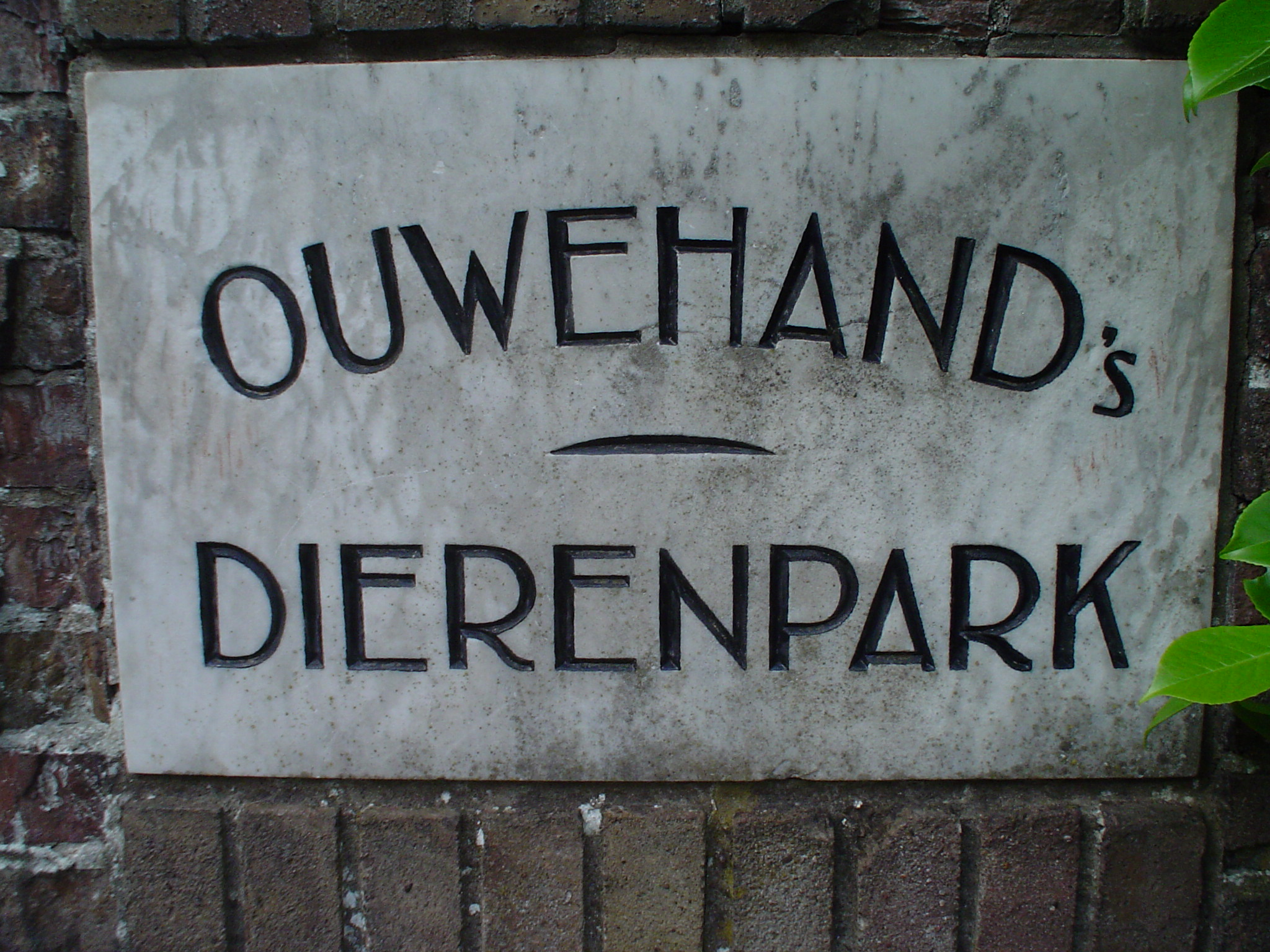 het bord bij de ingang van Ouwehands Dierenpark